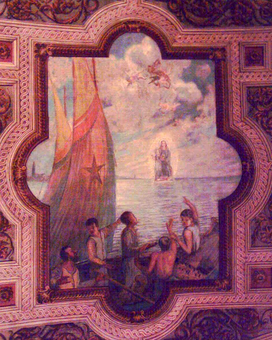 Volta affrescata del soffitto del Santuario della Madonna dell'Angelo, Caorle.